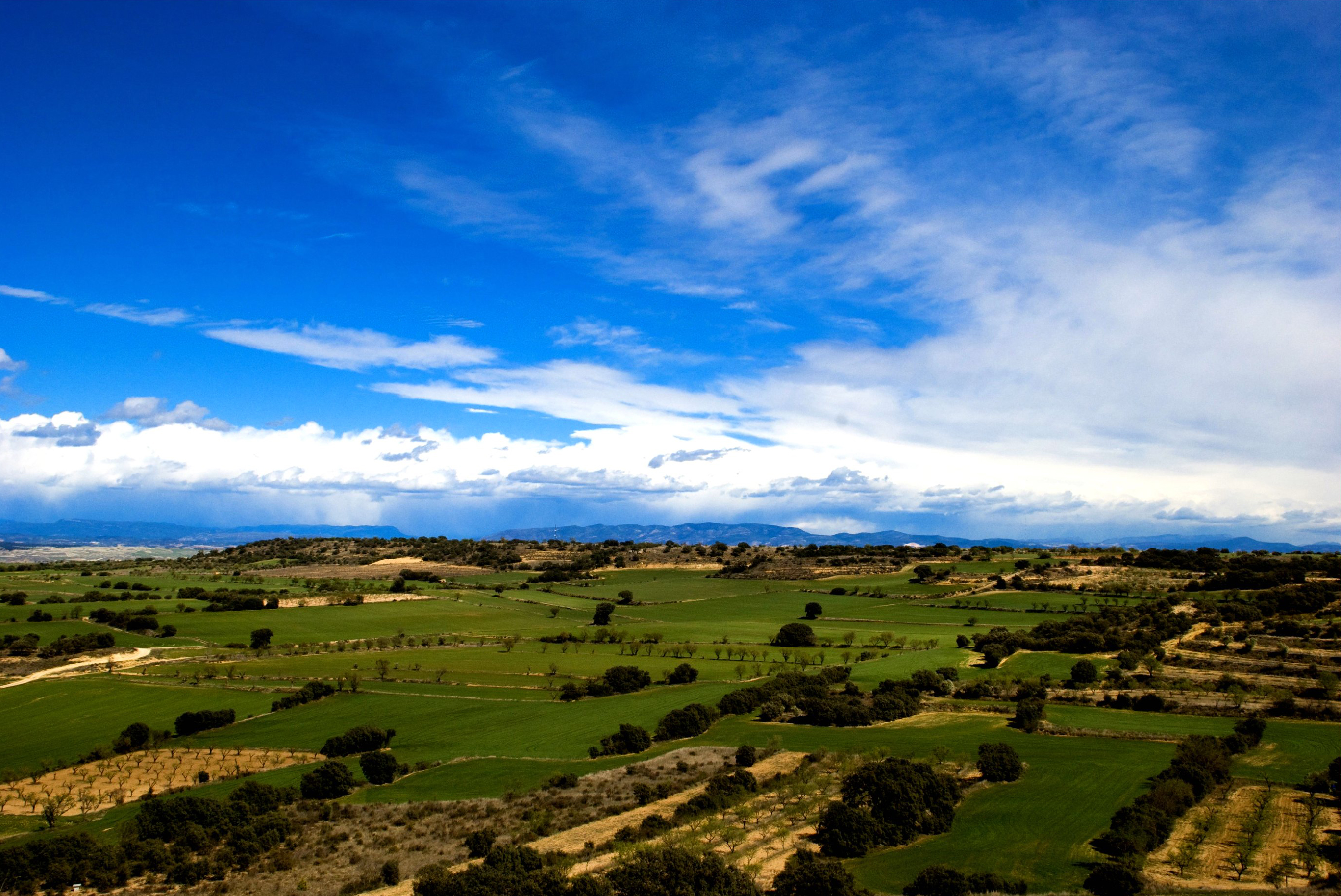 Somontano de Barbastro, Lagunarrota (Huesca, Aragón)